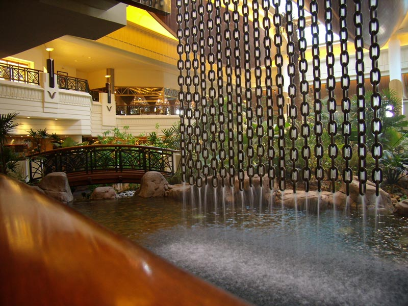 La vista da uno dei ristoranti all'interno del Grand Hyatt